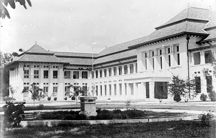 Repronegatief. Medische Hogeschool in Weltevreden, Batavia, Java